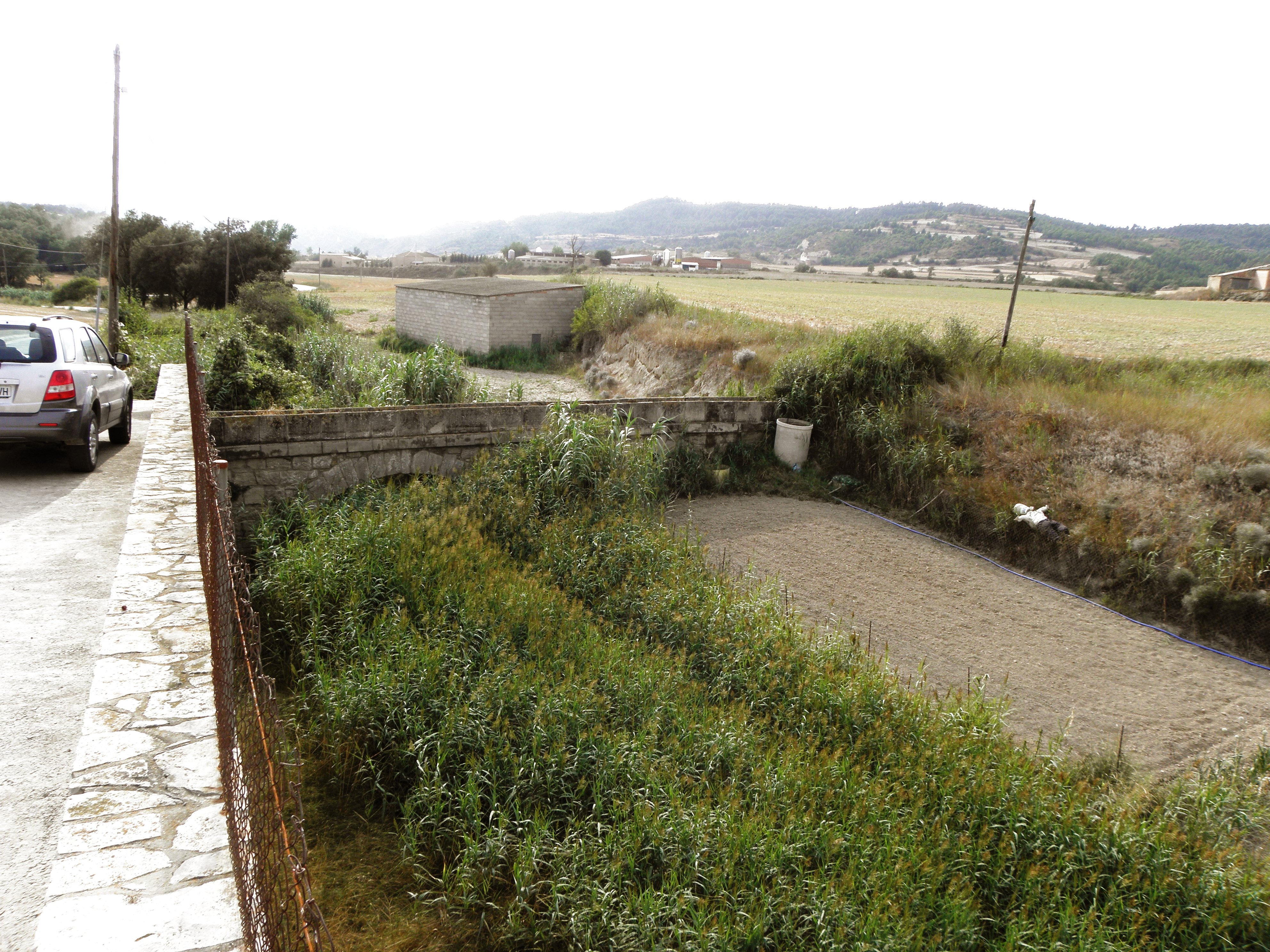 Enfesta (La Molsosa, Solsonès). El pontet (aqüeducte?) a l'entrada del poble.